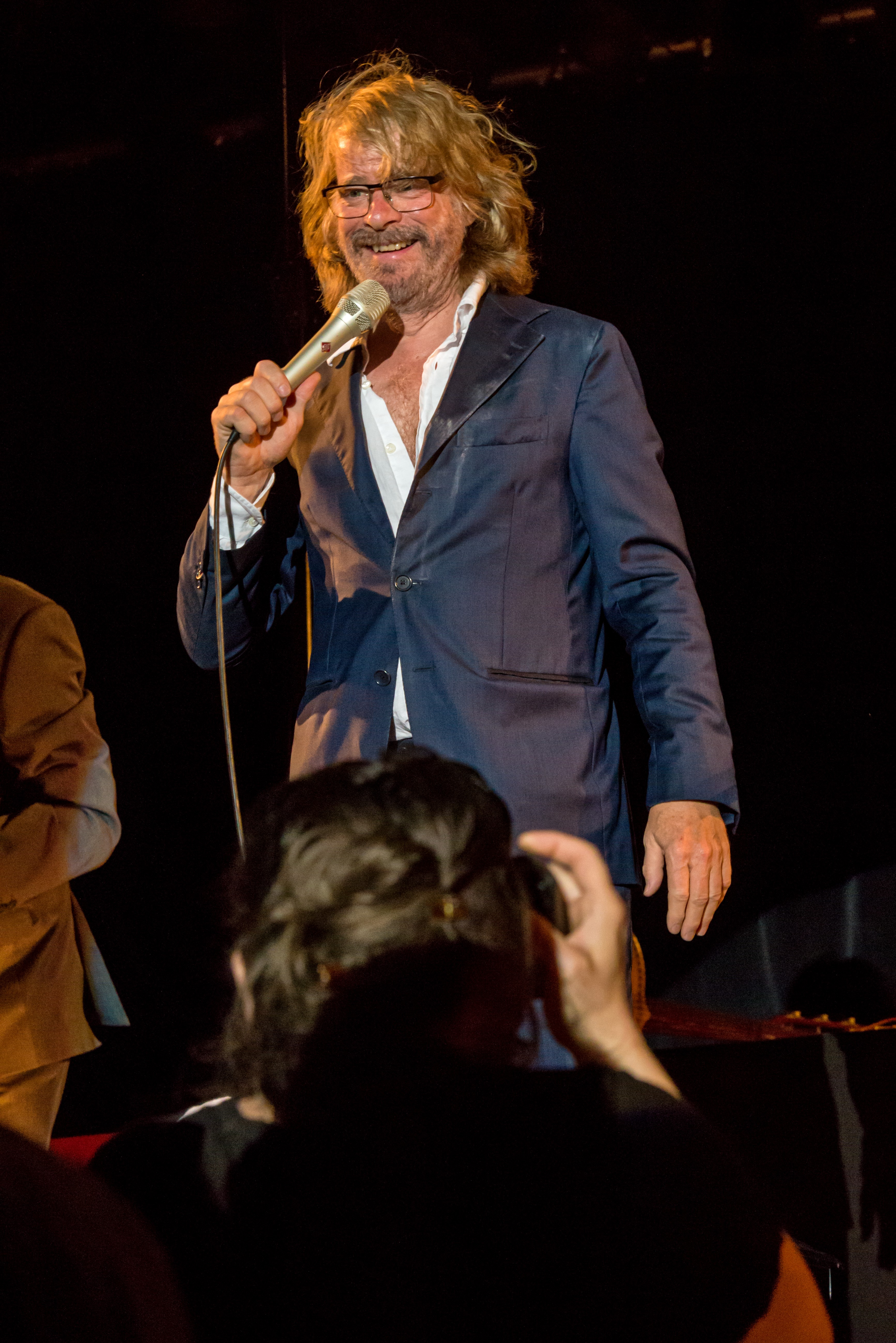 Bilder vom Zelt Musik Festival 2017 in Freiburg im Breisgau Helge Schneider am 10.07.2017